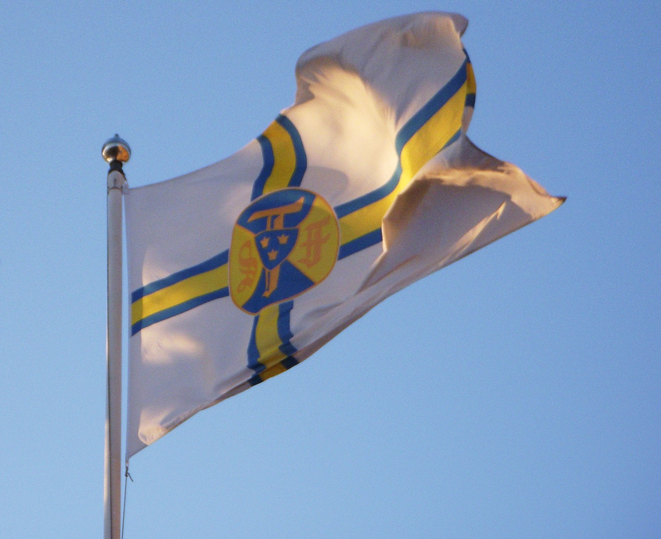 Svenska Turistföreningens flagga på Skeppsholmen